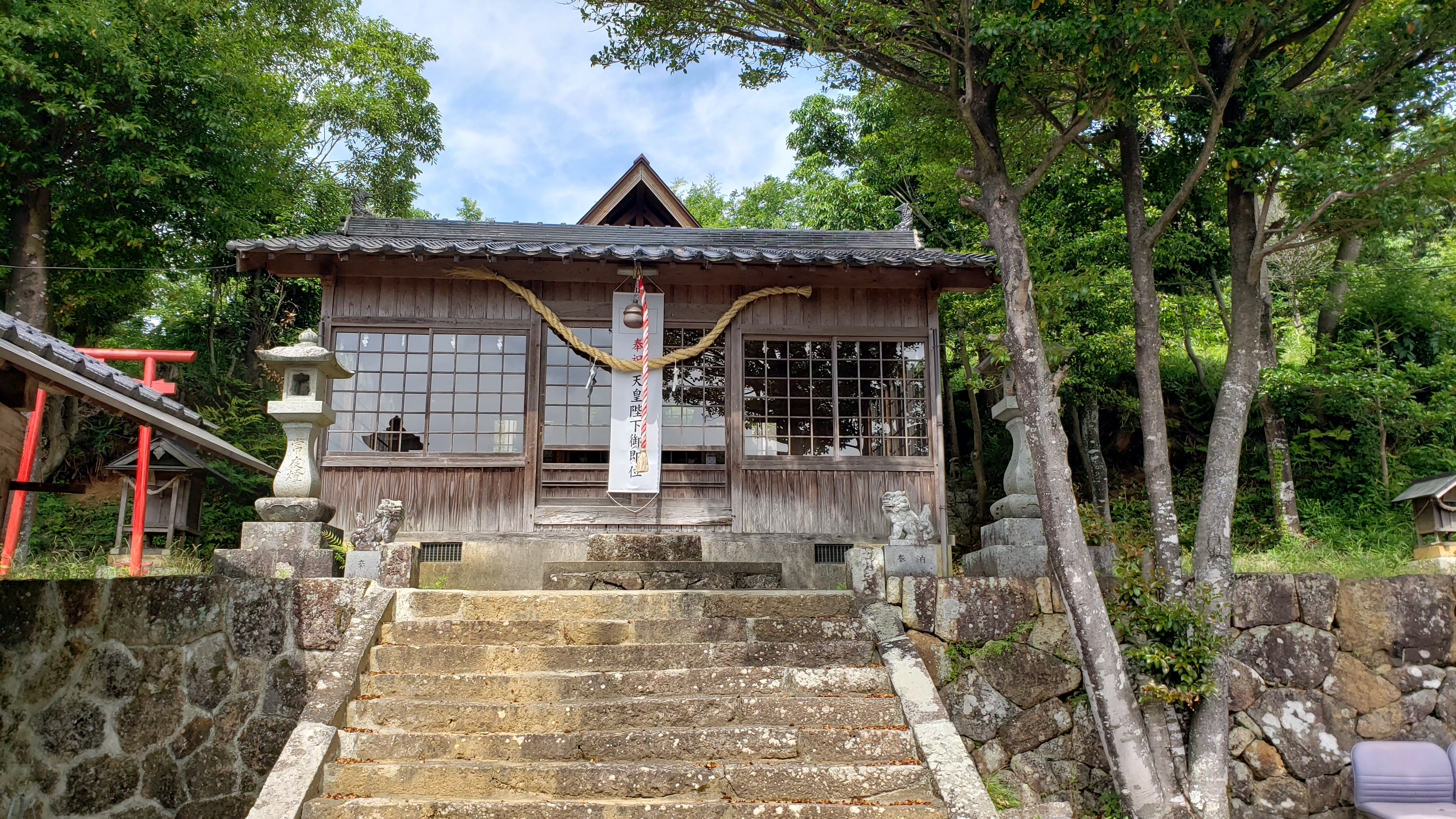 志戸部八幡神社の本殿